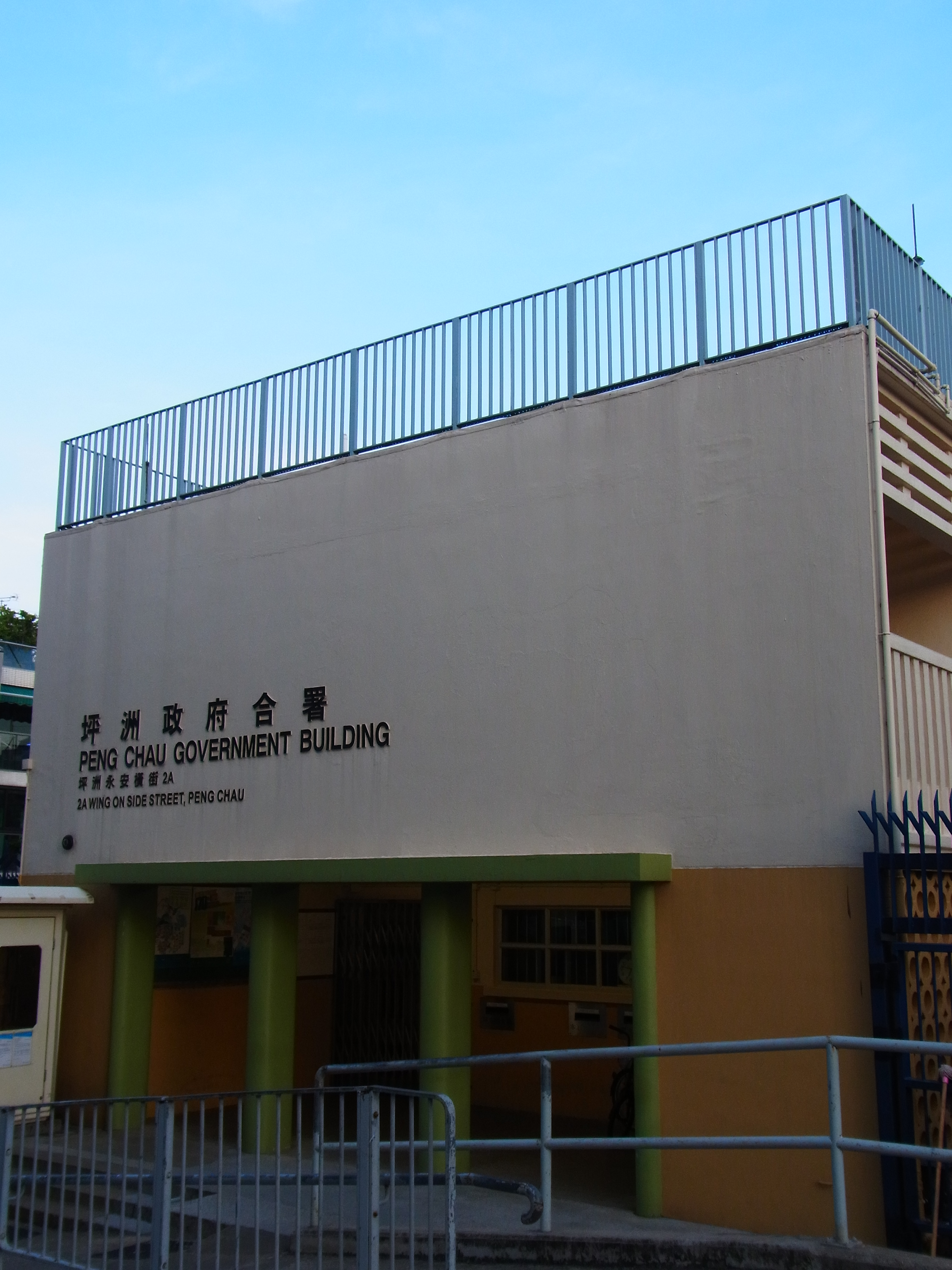 中文（香港）: 坪洲政府合署